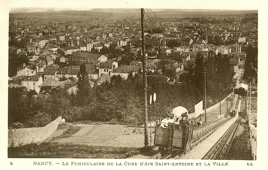 Carte postale ancienne éditée par LL n° 4, présentant le funiculaire de la Cure d'Air Saint-Antoine à Nancy avec une vue sur la ville vers 1905.